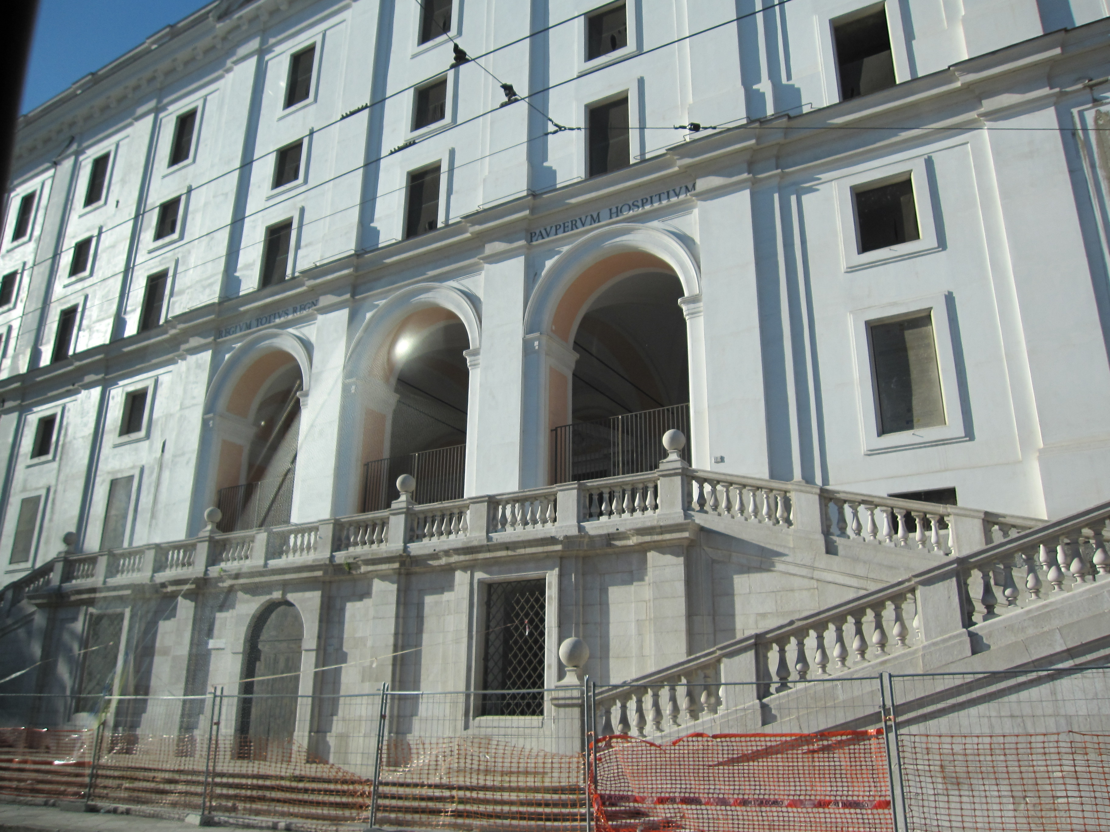 In Piazza Carlo III, Real Albergo dei Poveri - Napoli.